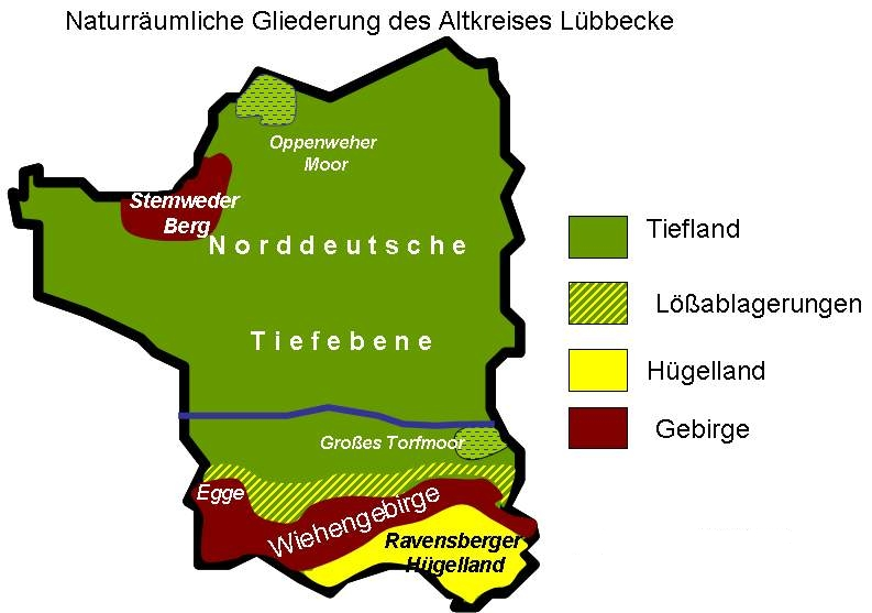 Naturräumliche Gliderung des Altkreises Lübbecke mit Stemweder Berg, Oppenweher Moor, Norddeutsche Tiefebene, Großes Torfmoor, Egge, Wiehengebirge und Ravensberger Hügelland